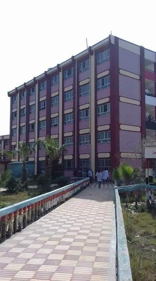 الصورة تظهر ظهر المدرسة الخلفي